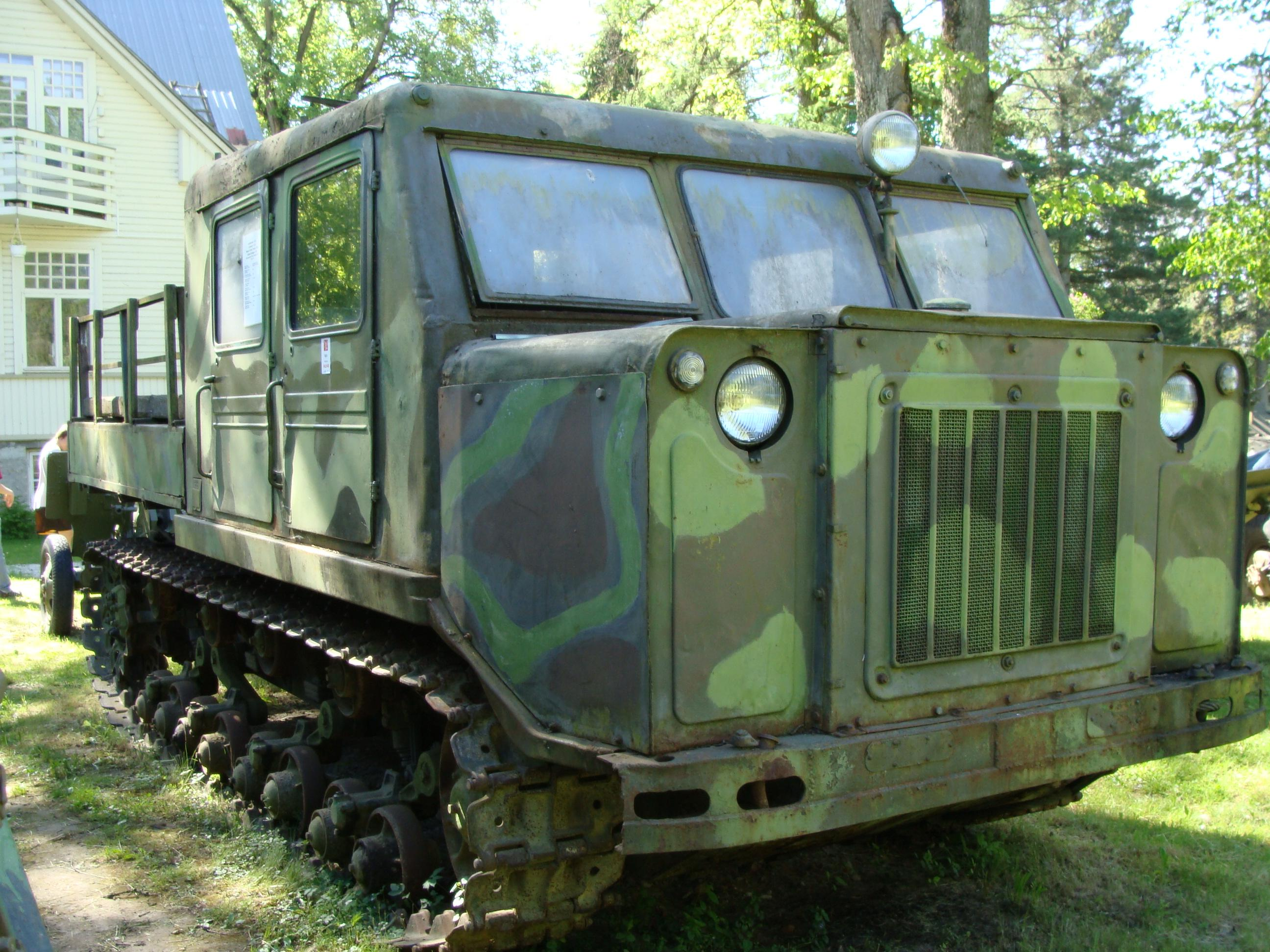 Vabadusõja muuseum